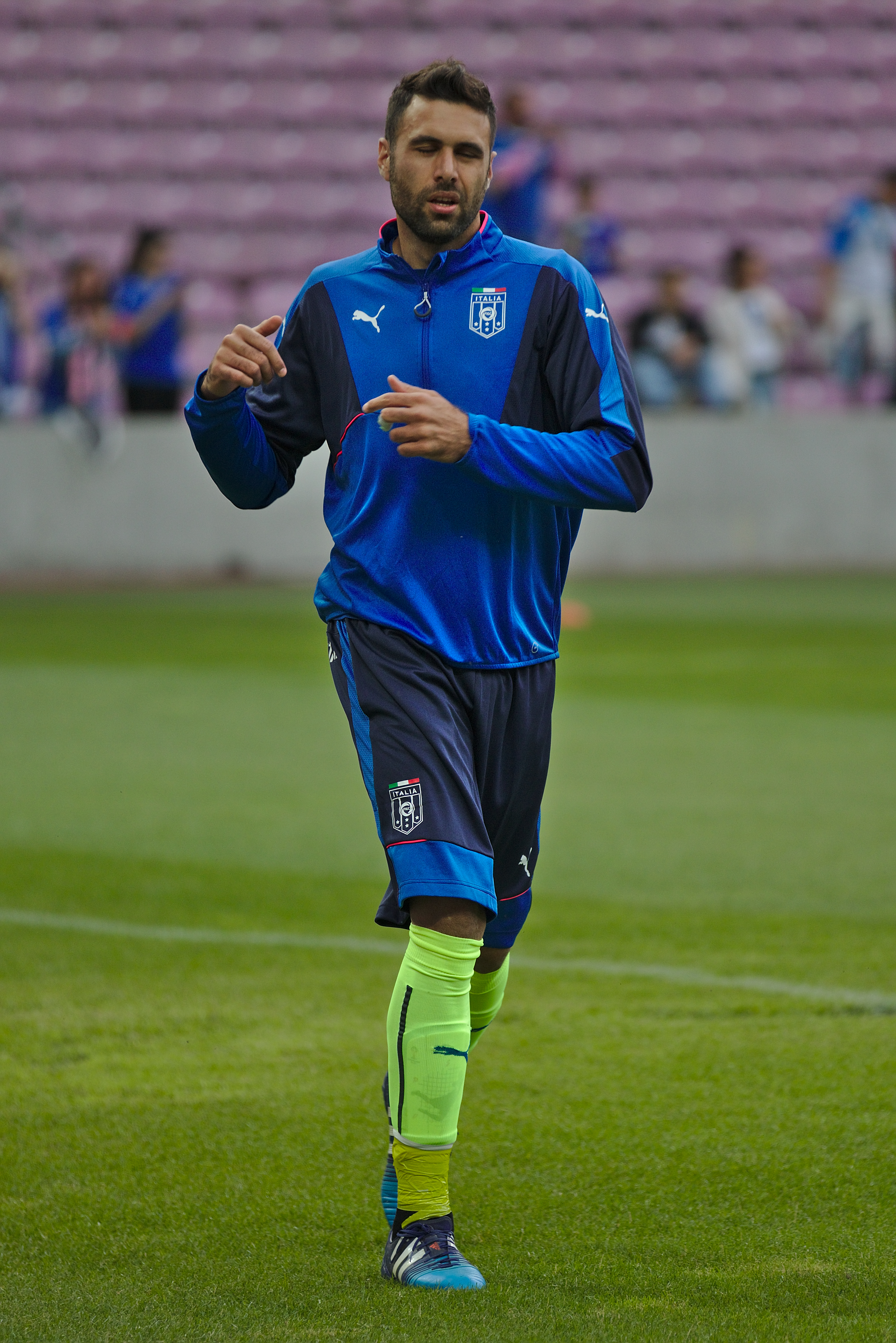 20150616 - Portugal - Italie - Genève - Salvatore Sirigu